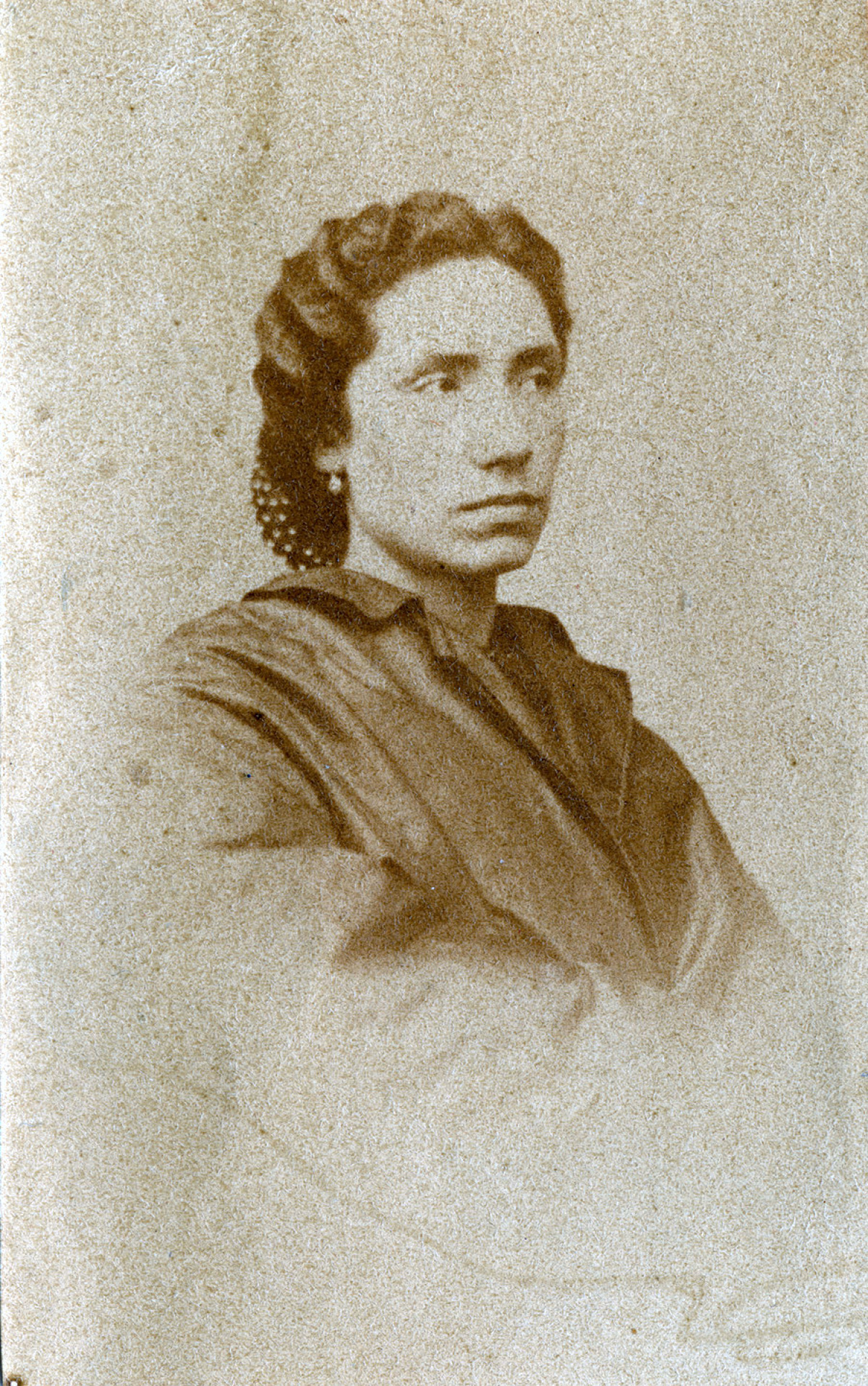 Rosalía Castro de Murguía, 1837-1885.